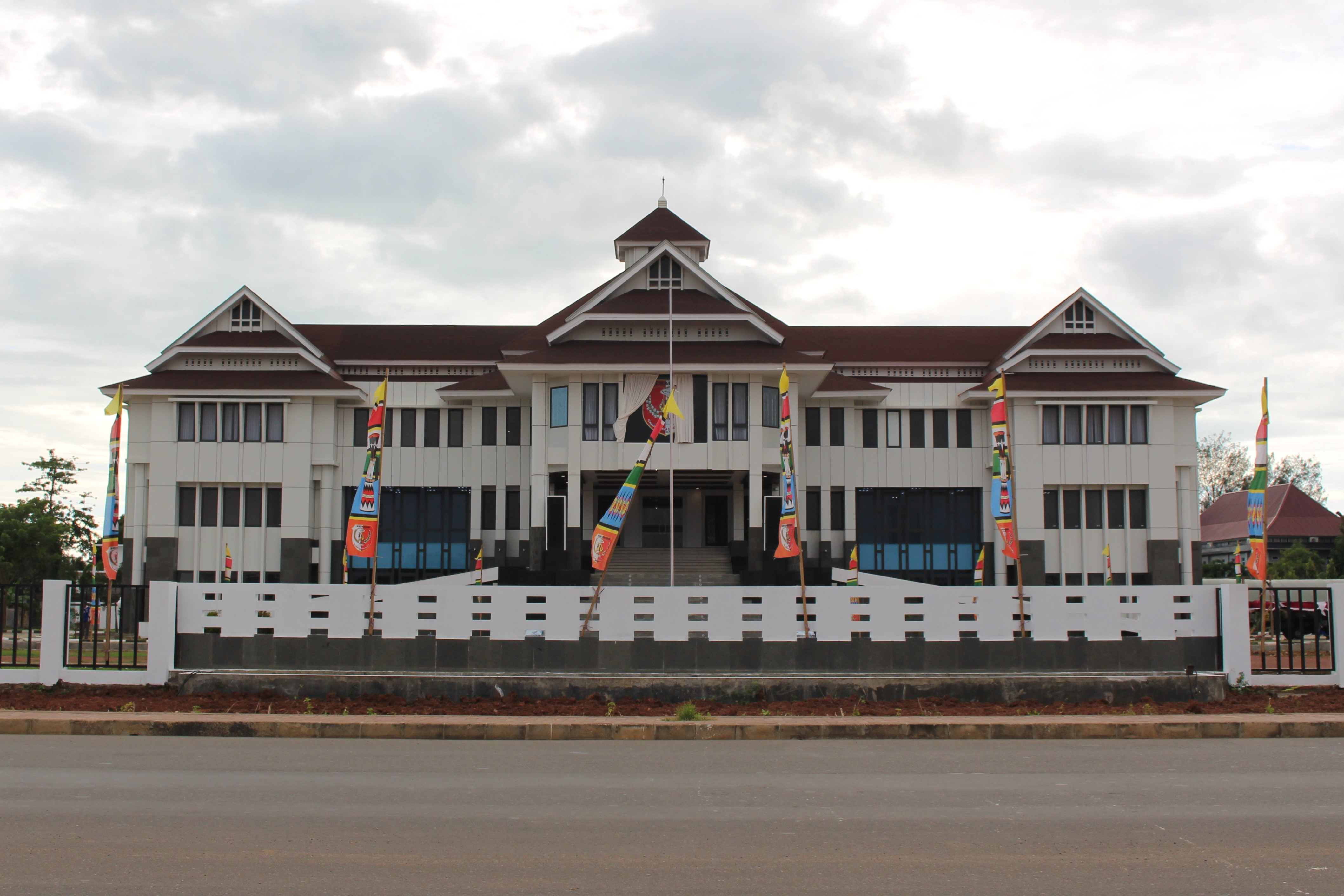 Kantor Bupati Merauke, Papua, Indonesia.